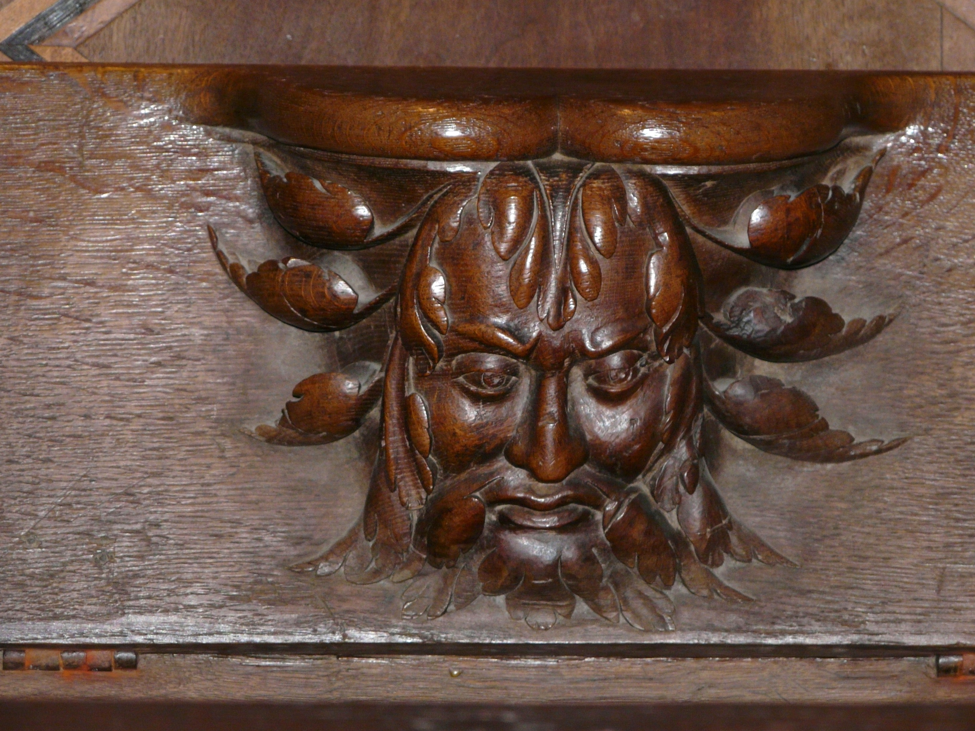 La miséricorde d'une stalle de la cathédrale Notre-Dame, Saint-Bertrand-de-Comminges, Haute-Garonne, France.